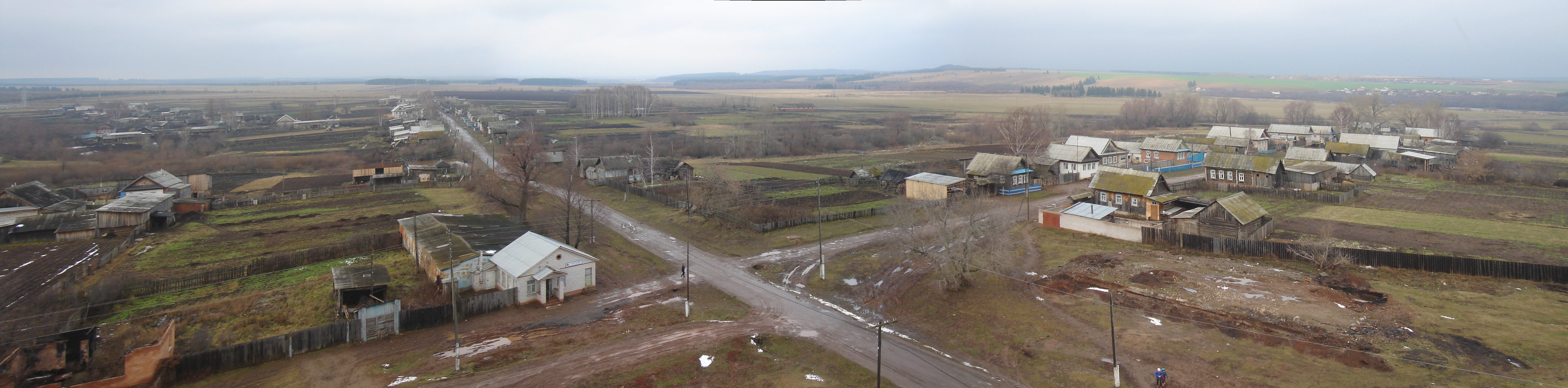 Вид на село Ильинское с колокольни Пророко-Ильинской церкви. Малопургинский район Удмуртии.